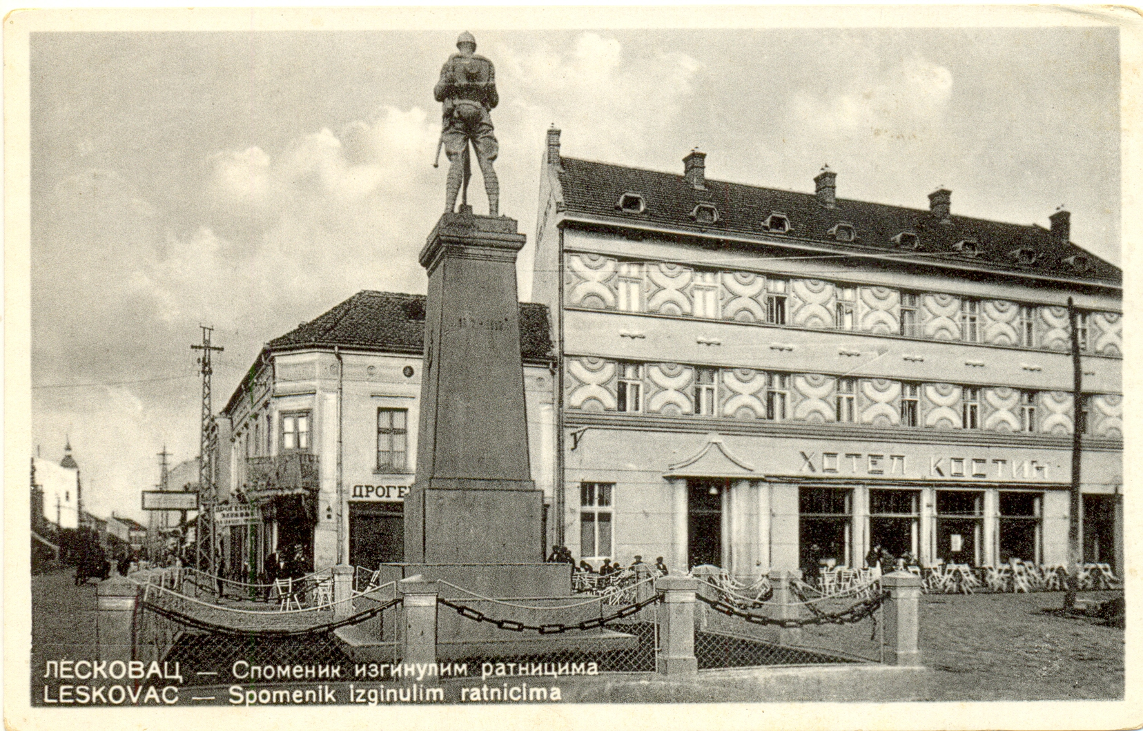 Srpski (latinica): Leskovac - Spomenik izginulim ratnicima, 1928.-1929. Motiv je Spomenik izginulim ratnicima i hotel Kostić u pozadini. Izdanje štamparskog zavoda Pokret, Leskovac.